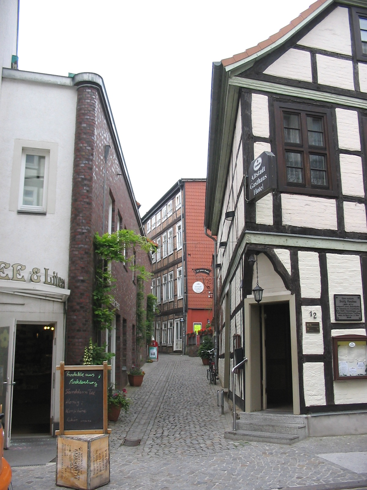 Gasse in Schwerin (Germany), Altstadt